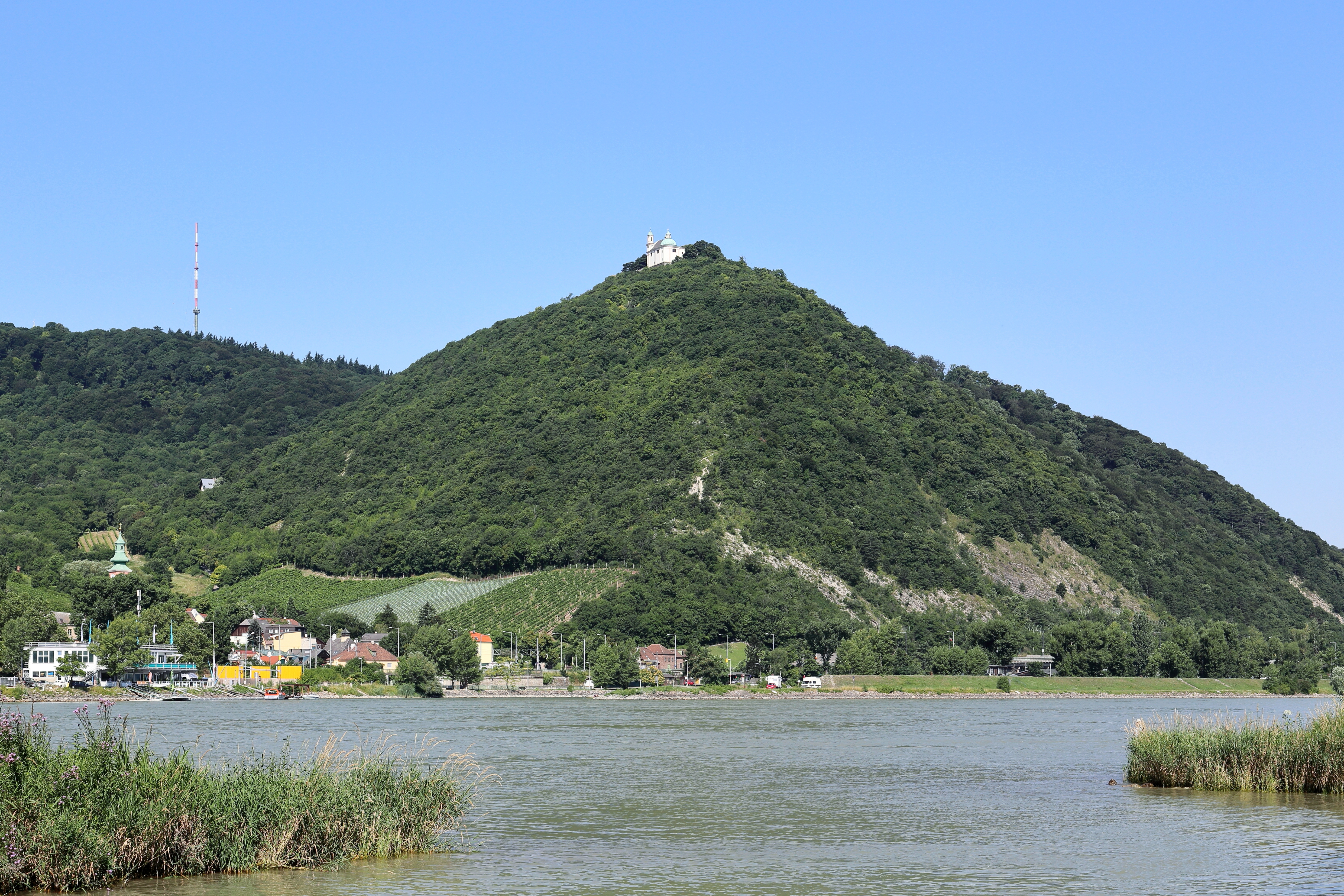 Südostansicht des 425 Meter hohen Leopoldsberges im 19. Wiener Gemeindebezirk Döbling mit der Leopoldsbergkirche. Im Vordergrund die Donau, links der Ort Kahlenbergerdorf und dahinter der 484 Meter hohen Kahlenberg mit dem Sender Kahlenberg.